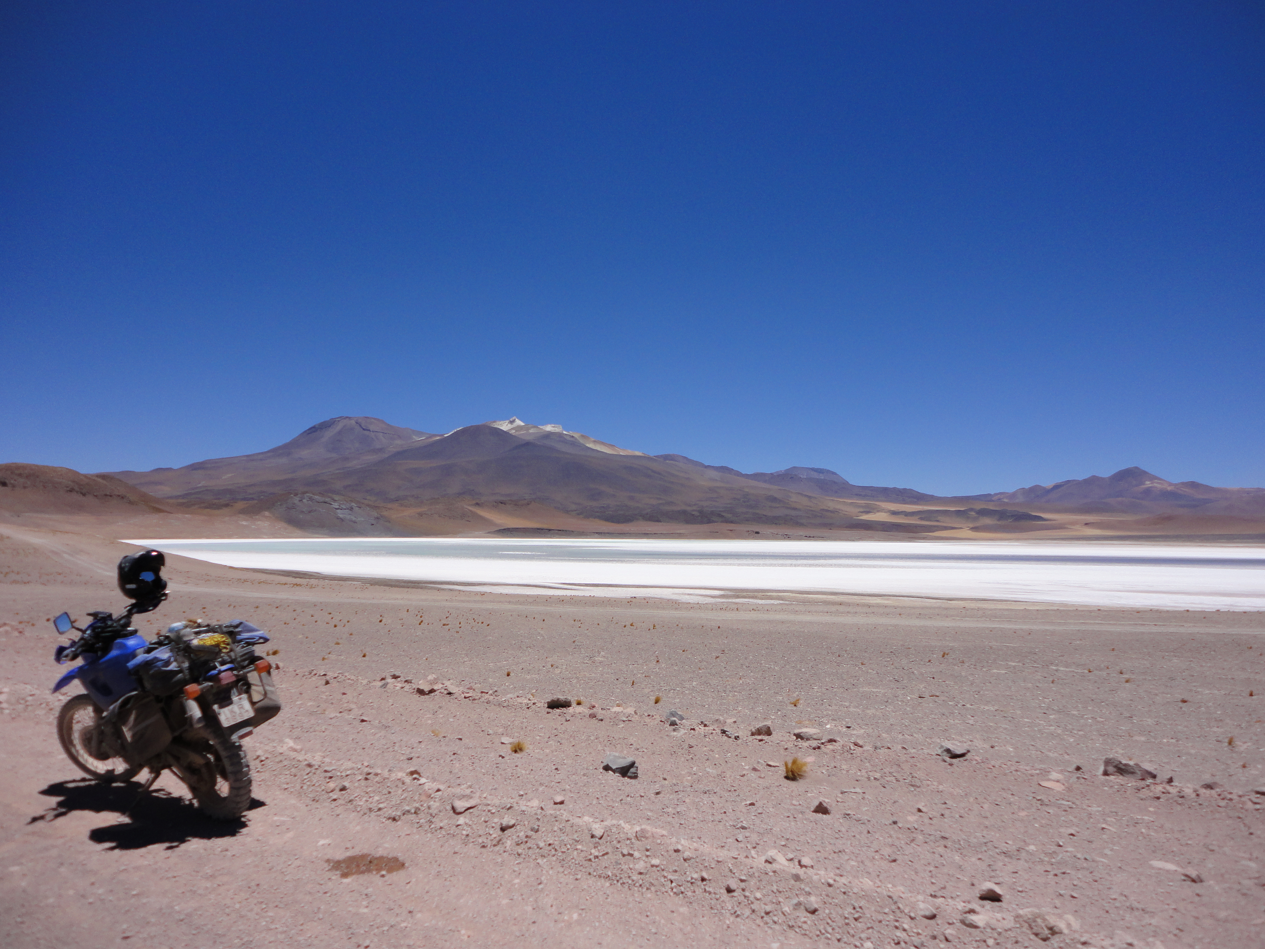 Laguna Tuyaito